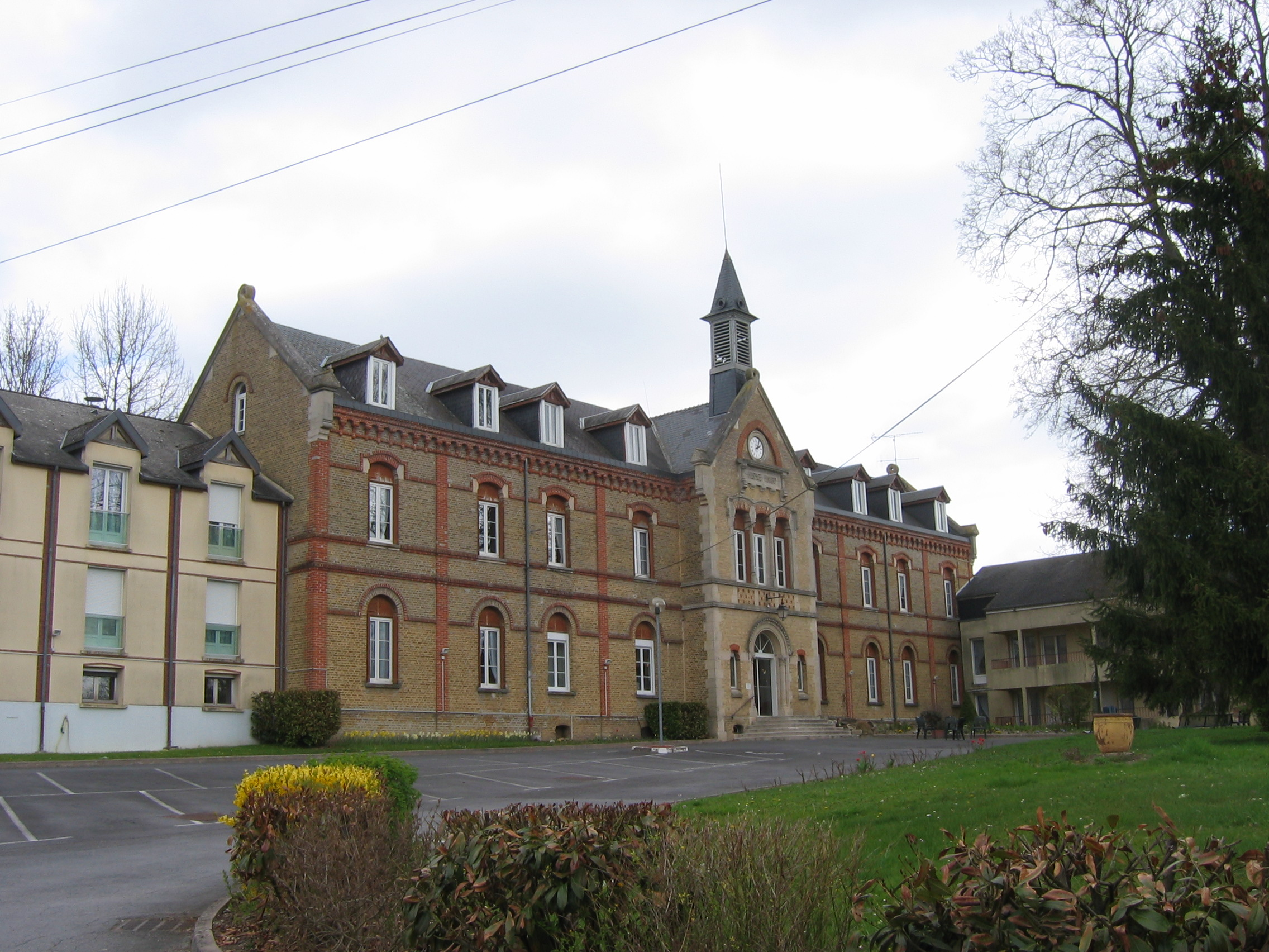 Hospice de St-Germainmont Ardennes France